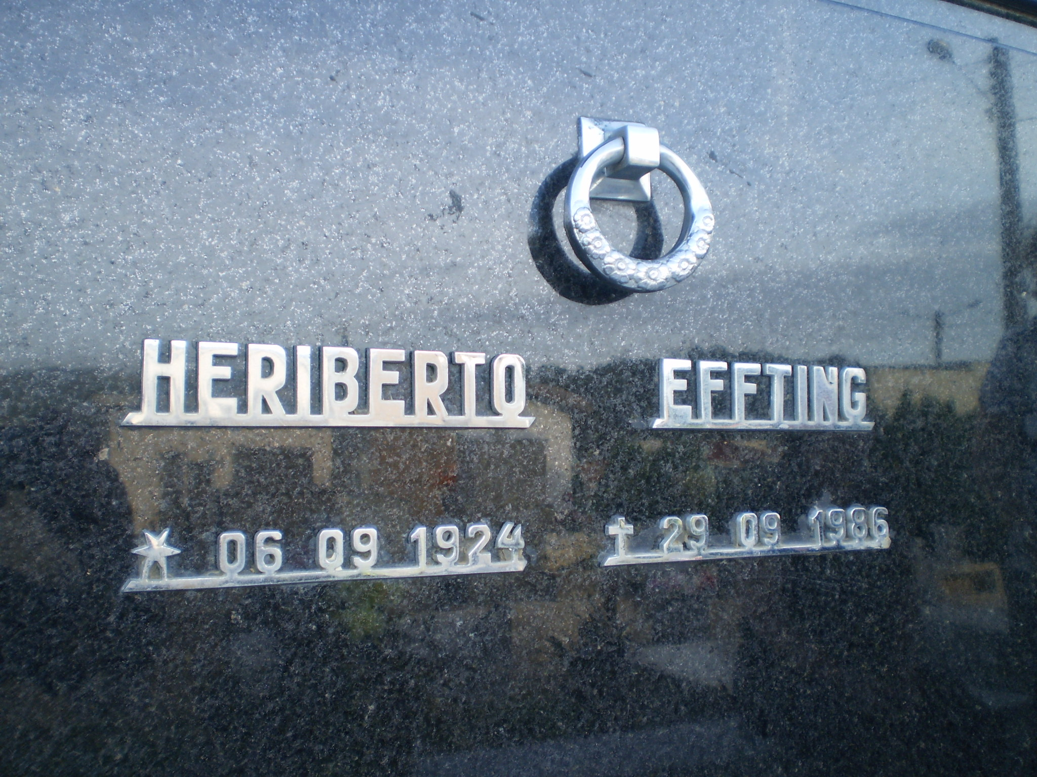 Heriberto Efting, cemitério municipal de Braço do Norte